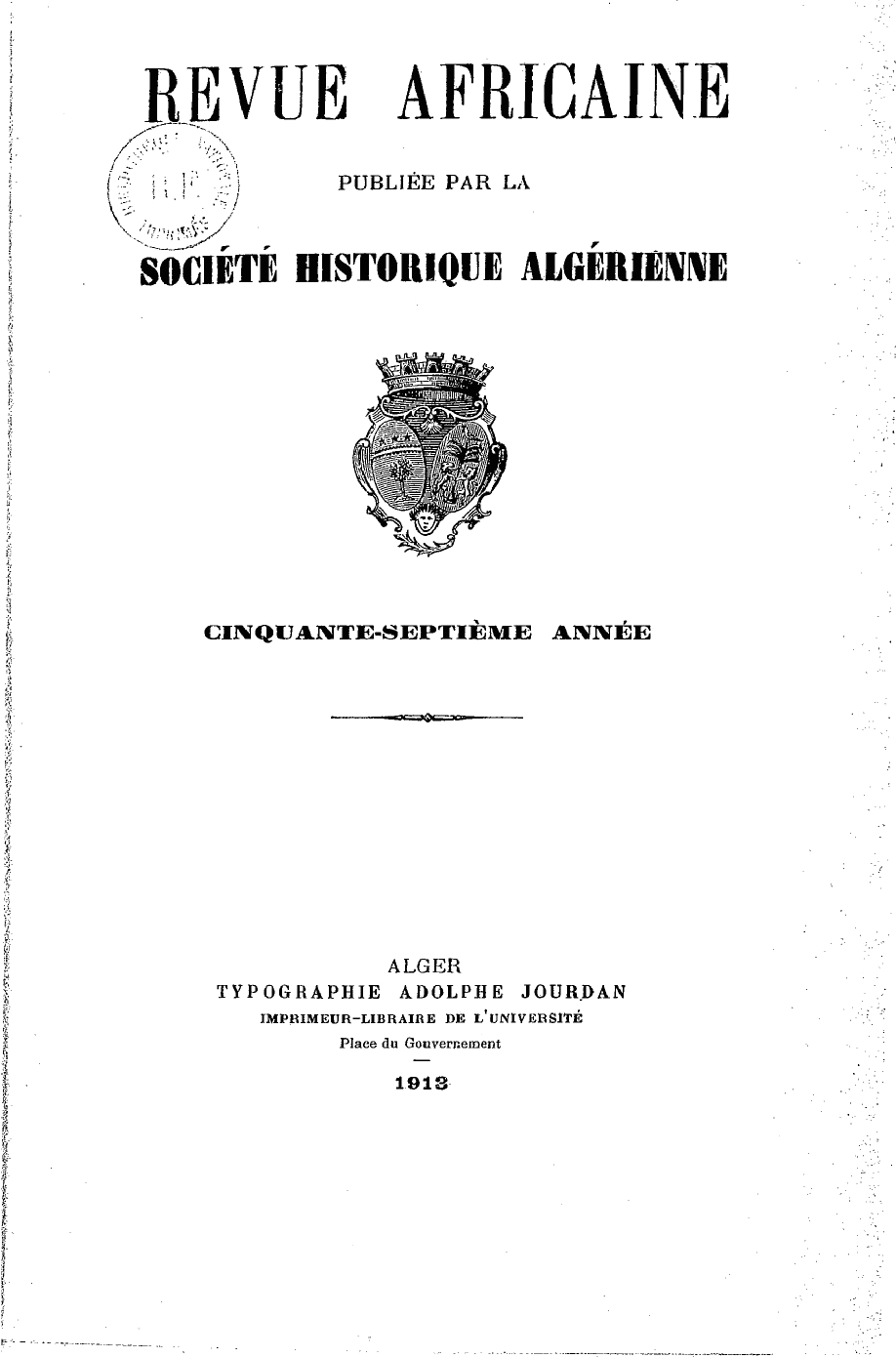 Revue africaine, publiée par la Société historique algérienne, 1913